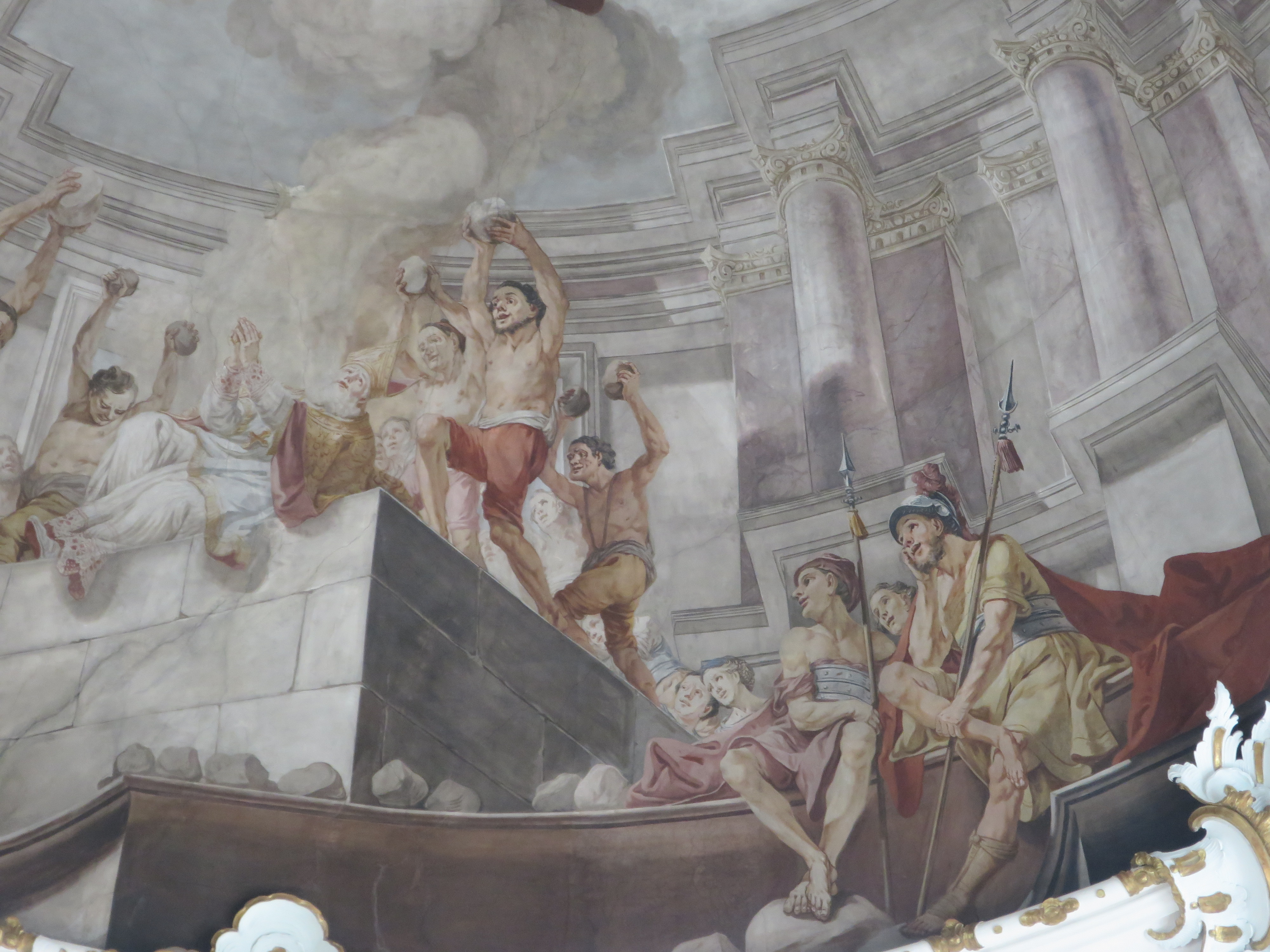 Ausschnitt aus dem Langhausfresko: Steinigung des Hl. Vigil.